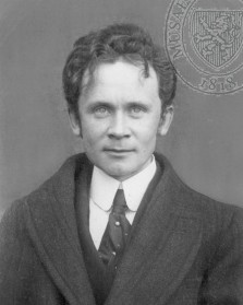 Boleška, Otto herec ND v Praze